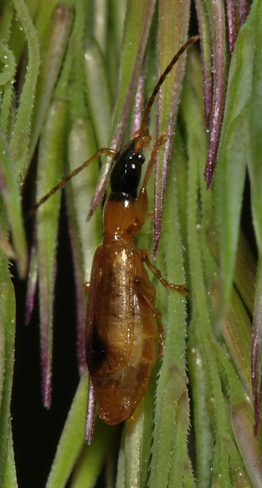 gravid female Demetrias monostigma from Cologne, Germany.